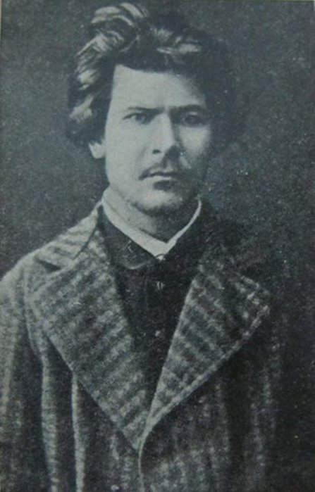 Aleksej Stepanovic Emel'janov, detto Bogoljubov (1852-1886), di Zemlja i Volja